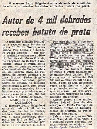 Jornal noticia Pedro Salgado recebendo a Batuta de Prata